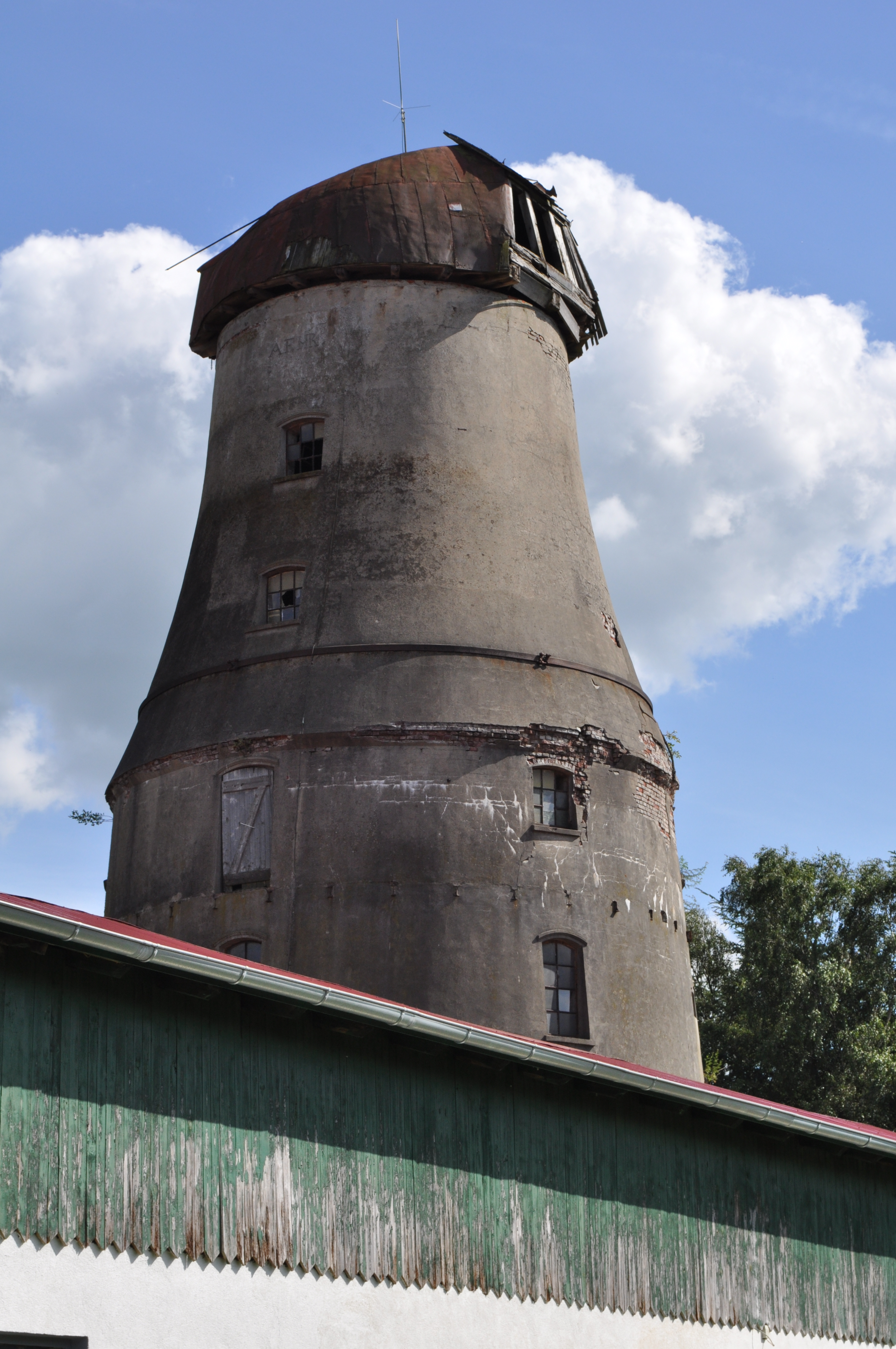 Ehemalige Warstader Mühle in Hemmoor. This is a photograph of an architectural monument. .202.200.057